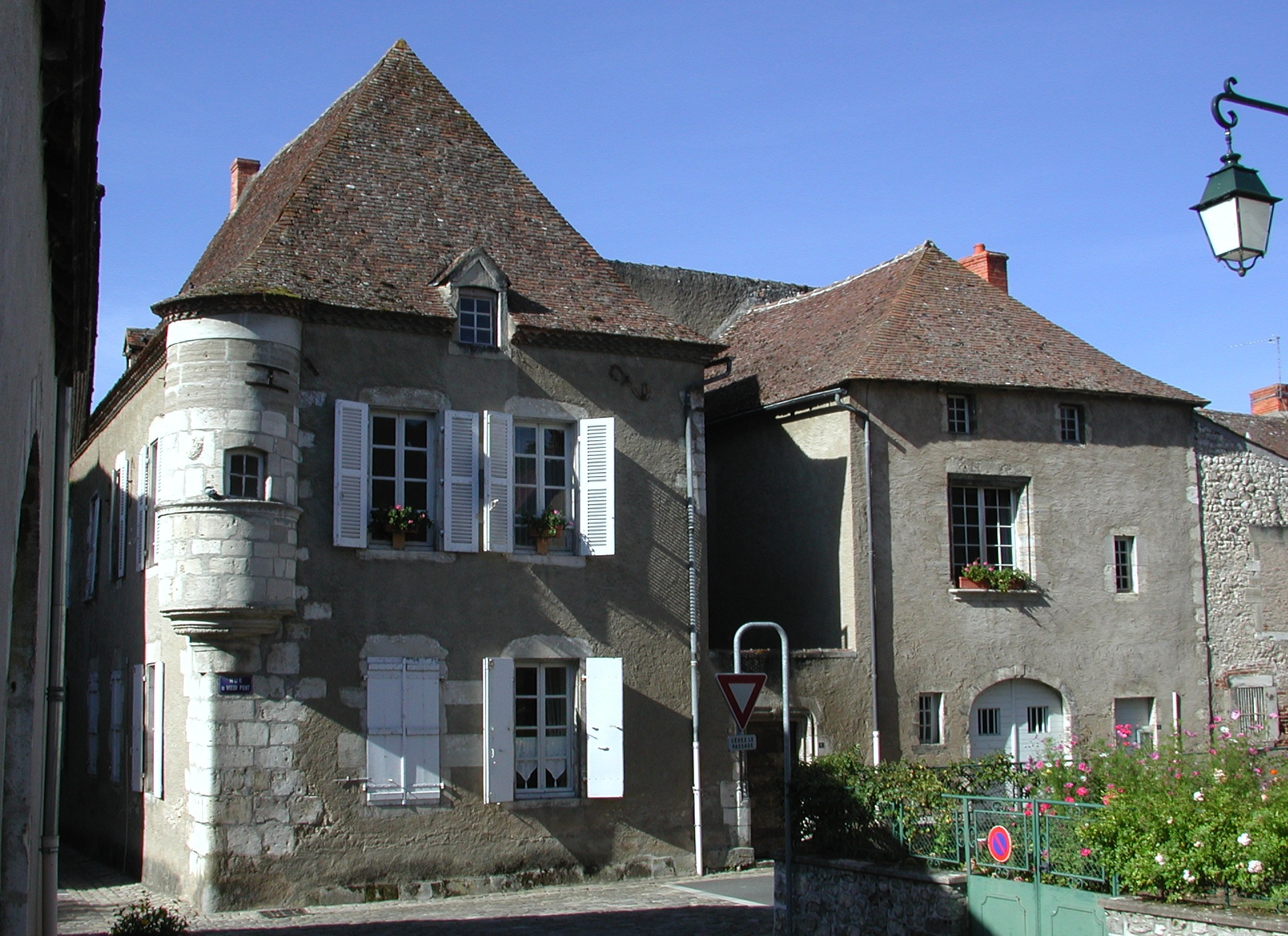 Ébreuil (Allier). Maison du XVe siècle à échauguette. Façade nord-est.